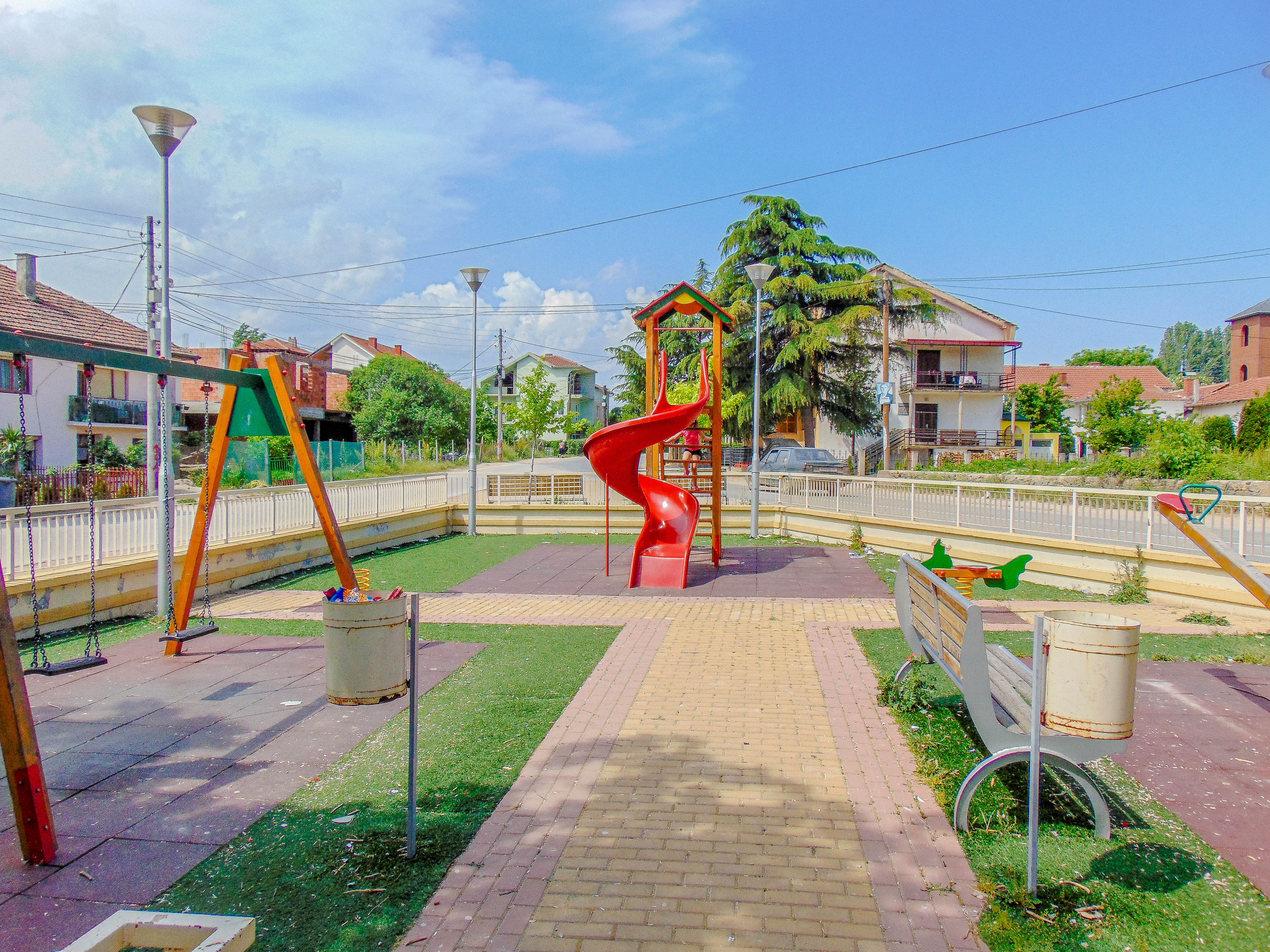 Раклиш